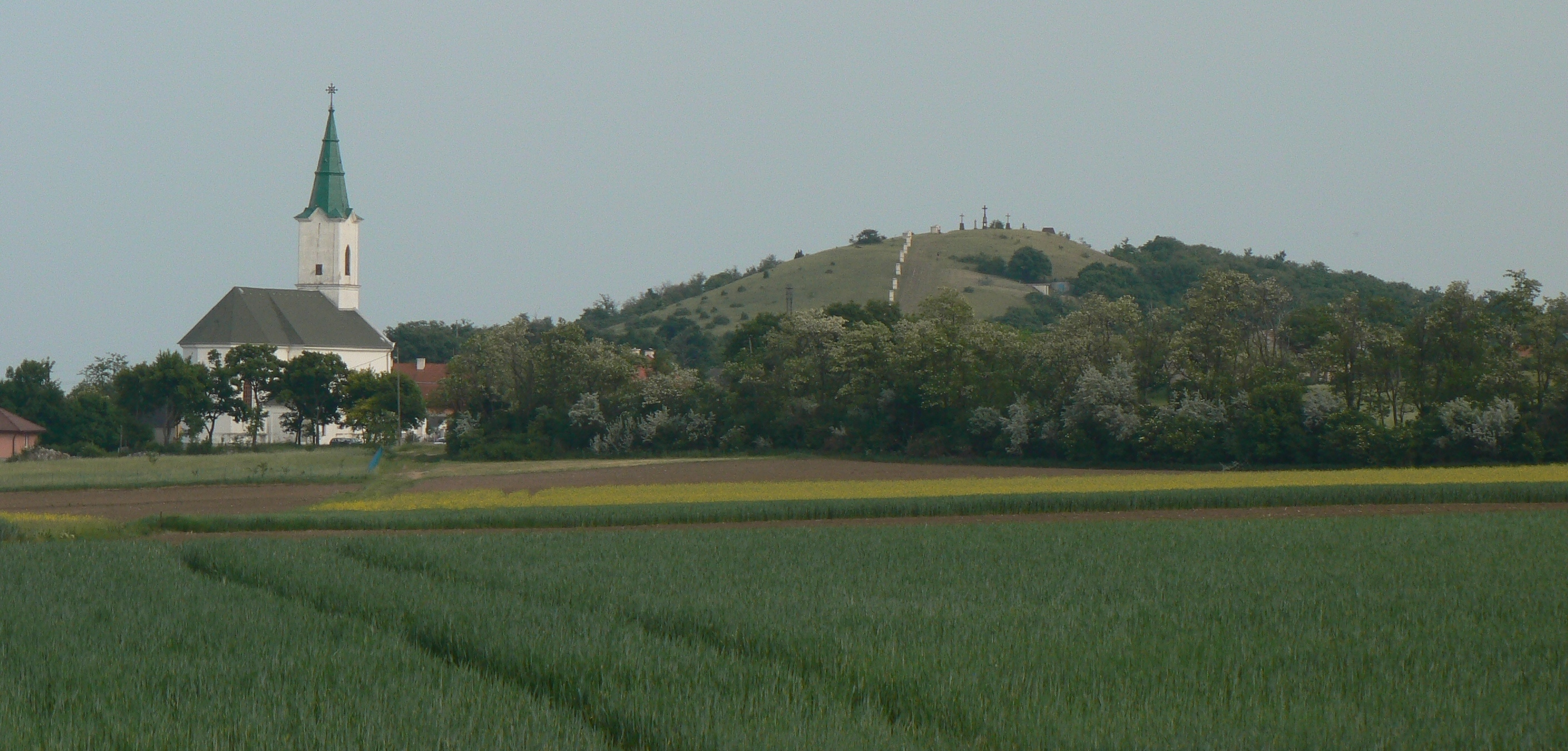 A kálváriadomb panorámája, Veszprémfajsz.